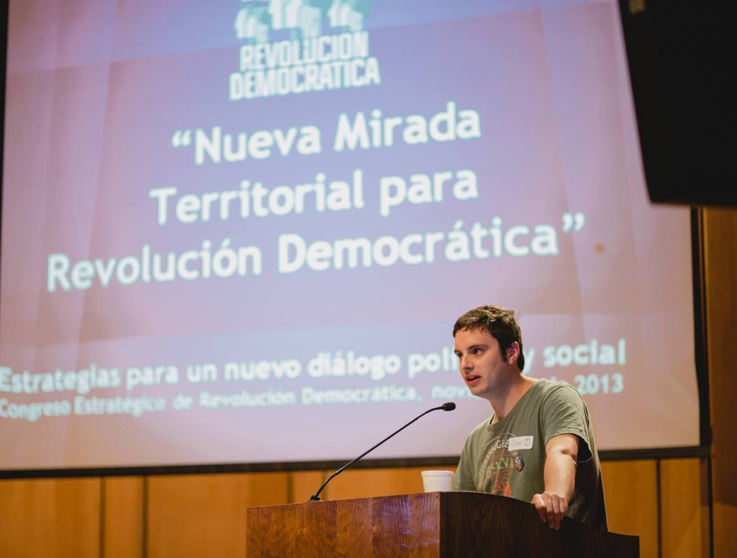 Jaime Sáez exponiendo en el congreso estratégico de Revolución Democrática en noviembre de 2013